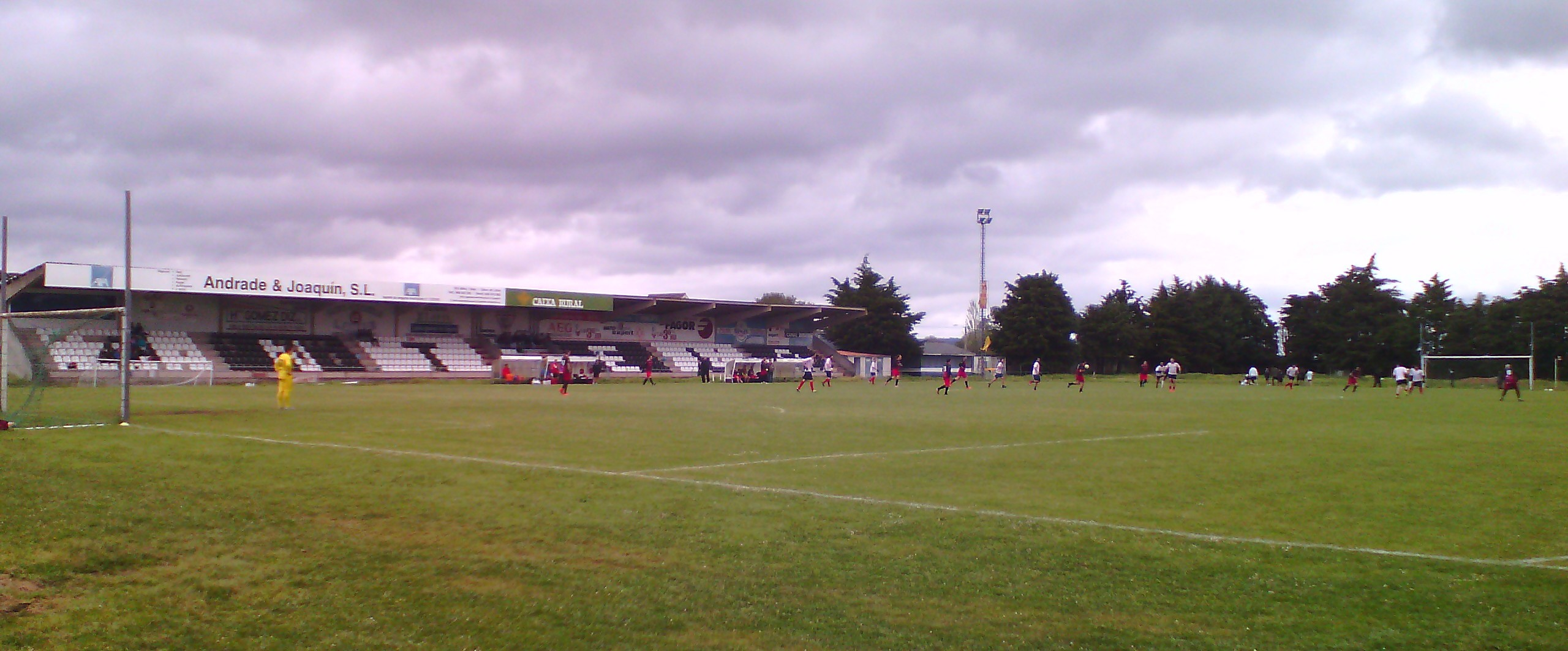 Campo de fútbol da Moreira, en Xinzo de Limia, nun partido de fútbol gaélico entre Herdeiros de Dhais e Estrela Vermelha FG